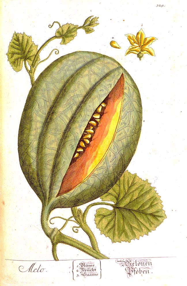 Nikolaus Friedrich Eisenberger : Hand-coloured engraving